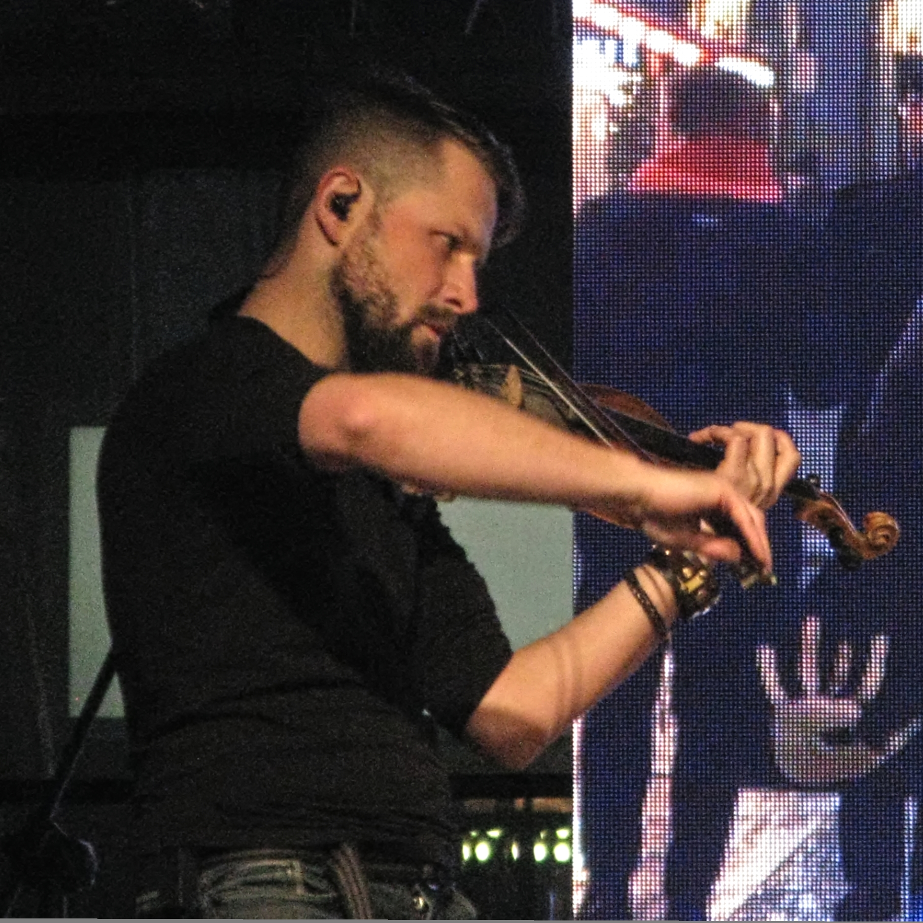 Adam Romański gra na skrzypcach podczas koncertu zespołu Krzikopa na katowickim rynku, darmowa plenerowa impreza ze wstępem wolnym towarzysząca Jarmarkom Śląskim (Jarmark Bożonarodzeniowy 2018 w Katowicach)